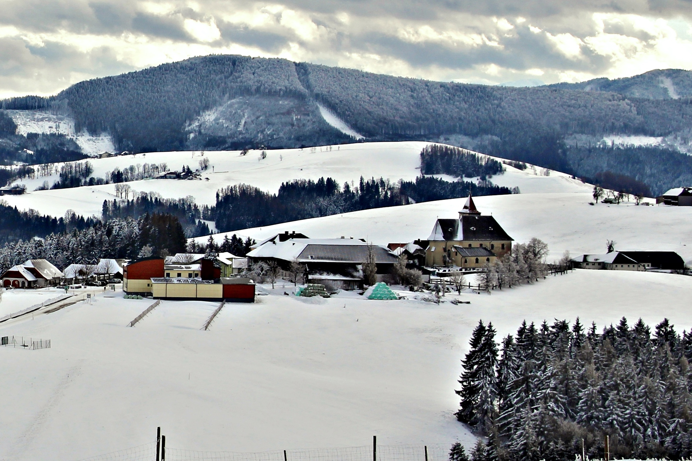 Kürnberg ist eine Ortschaft der Gemeinde St. Peter in der Au im Mostviertel (Niederösterreich)